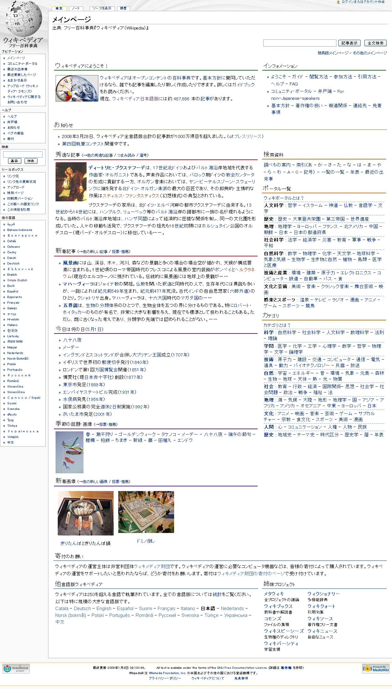 Japanese Wikipedia Main Page